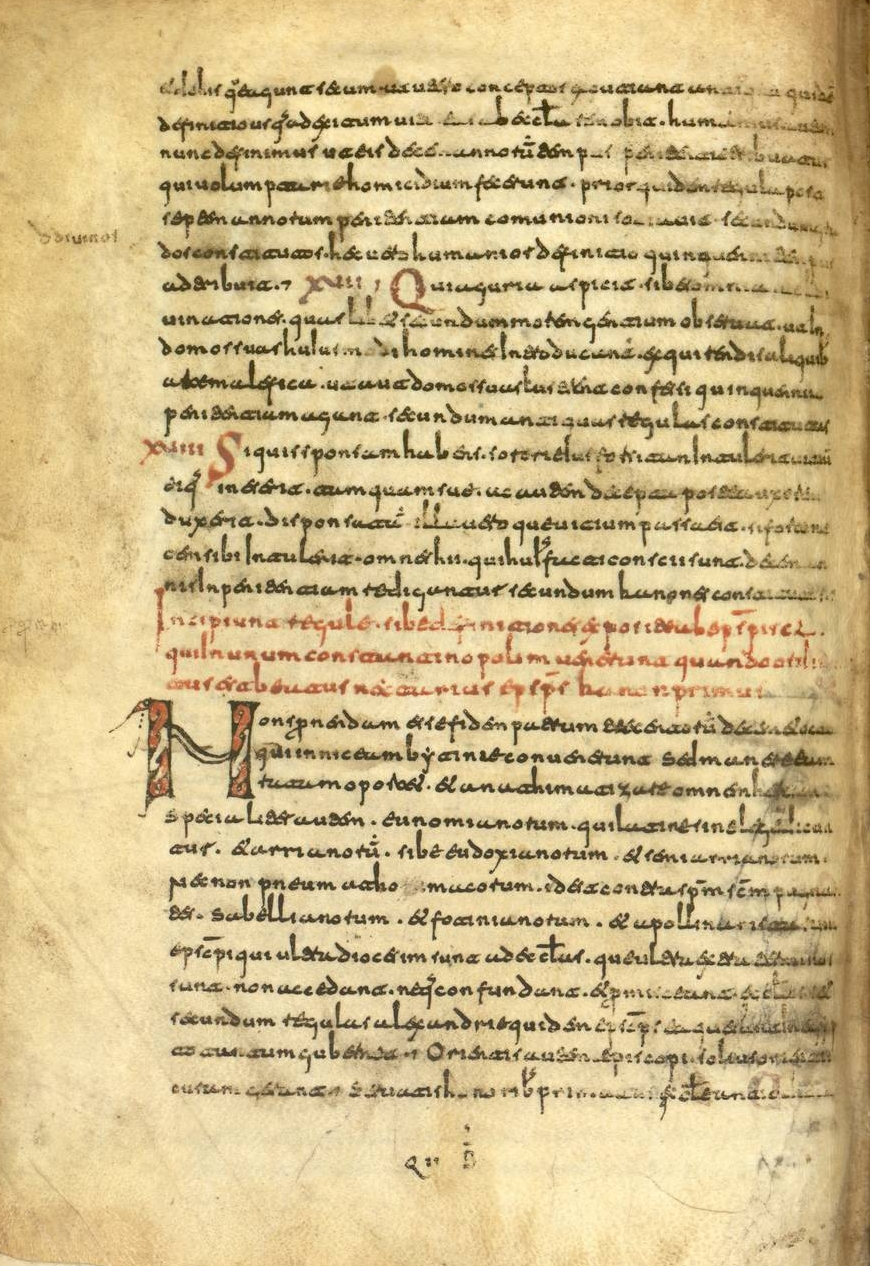 Fragmenta canonica. Folio 15 vuelto. En la línea 17, miniado en rojo, comienza un íncipit que reza: "Incipiunt regule sibe definitiones exposite ab episcopis CL [lín. 18] qui in unum Constantinopolim uenerunt...". En la la línea 20 una N capitular miniada, que comienza la frase: "Non spernendam esse fidem..." Manuscrito de los siglos VIII-IX. Letra visigótica. 15 hojas de pergamino 28 x 21 cm. Caja de escritura: 20 x 14 cm. 31 líneas por página. Cuadernos de 8 hojas; pautado a punta seca; iniciales en rojo; uso del minio en las rúbricas. Signaturas alfanuméricas; foliación moderna, a pluma y en arábigos. Biblioteca de la Real Academia de la Historia de España. Signatura: Cod. 44(1). Ubicación anterior: olim F 128 y 52 Biblioteca Virtual del Patrimonio Bibliográfico (España): BVPB20100000472. Procedente del Monasterio de San Millán de la Cogolla; tras la desamortización. Depositado en la Biblioteca de Cortes, más tarde recaló en la Biblioteca de la Real Academia de la Historia. Contiene: [Decretale in urbe Roma: De scripturis divinis / Horsmida, Papa] (h. 1r-3v). [Historiae ecclesiasticae / Eusebius Caeriensis ; traducido por Rufinus Aquileiensis] (h. 3v-7v). Capitula concilii Nicheni ad Attico episcopo Constantinopolitano. Concilium sibe synodum aput Ancyram. Regule sibe exposite ab episcopis CL. Ref.: Elisa Ruiz García, Catálogo de la sección de códices de la Real Academia de la Historia, Madrid, Real Academia de la Historia, 1997, págs. 275-278, cód. 44.